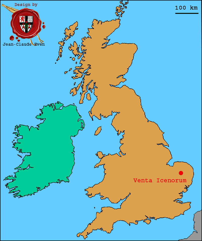 Caistor St Edmund